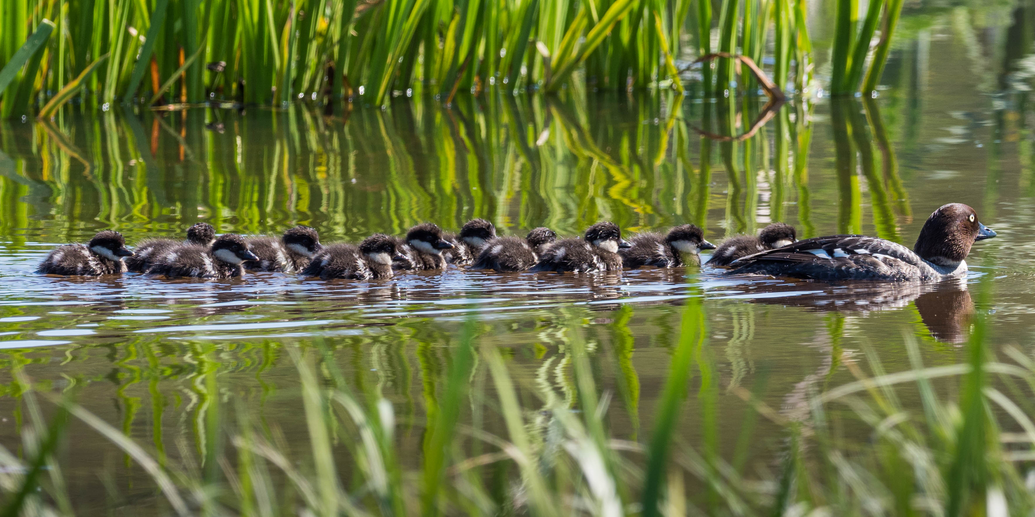 Busephala clangula